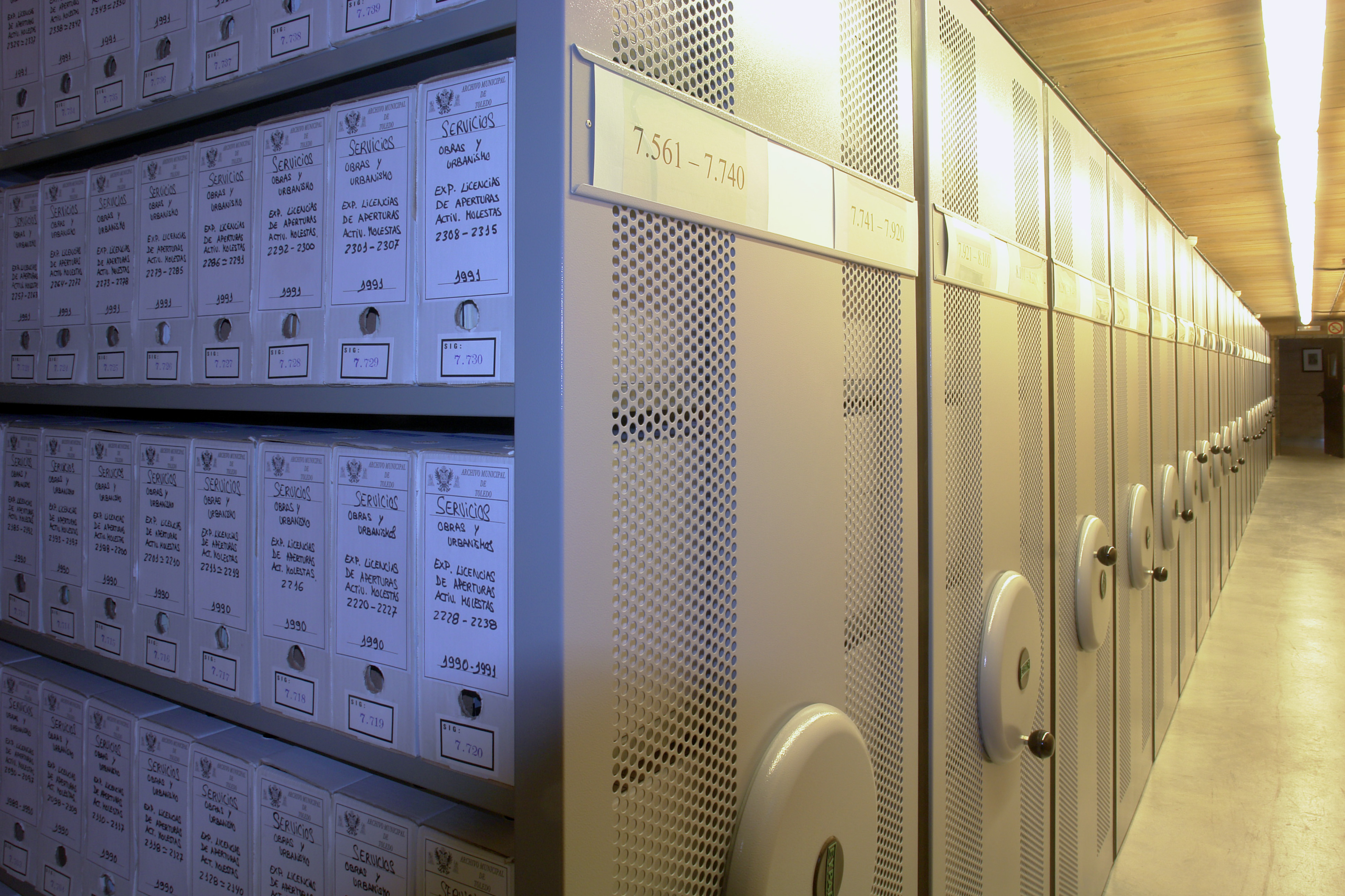 Instancias del Archivo Municiapal de Toledo